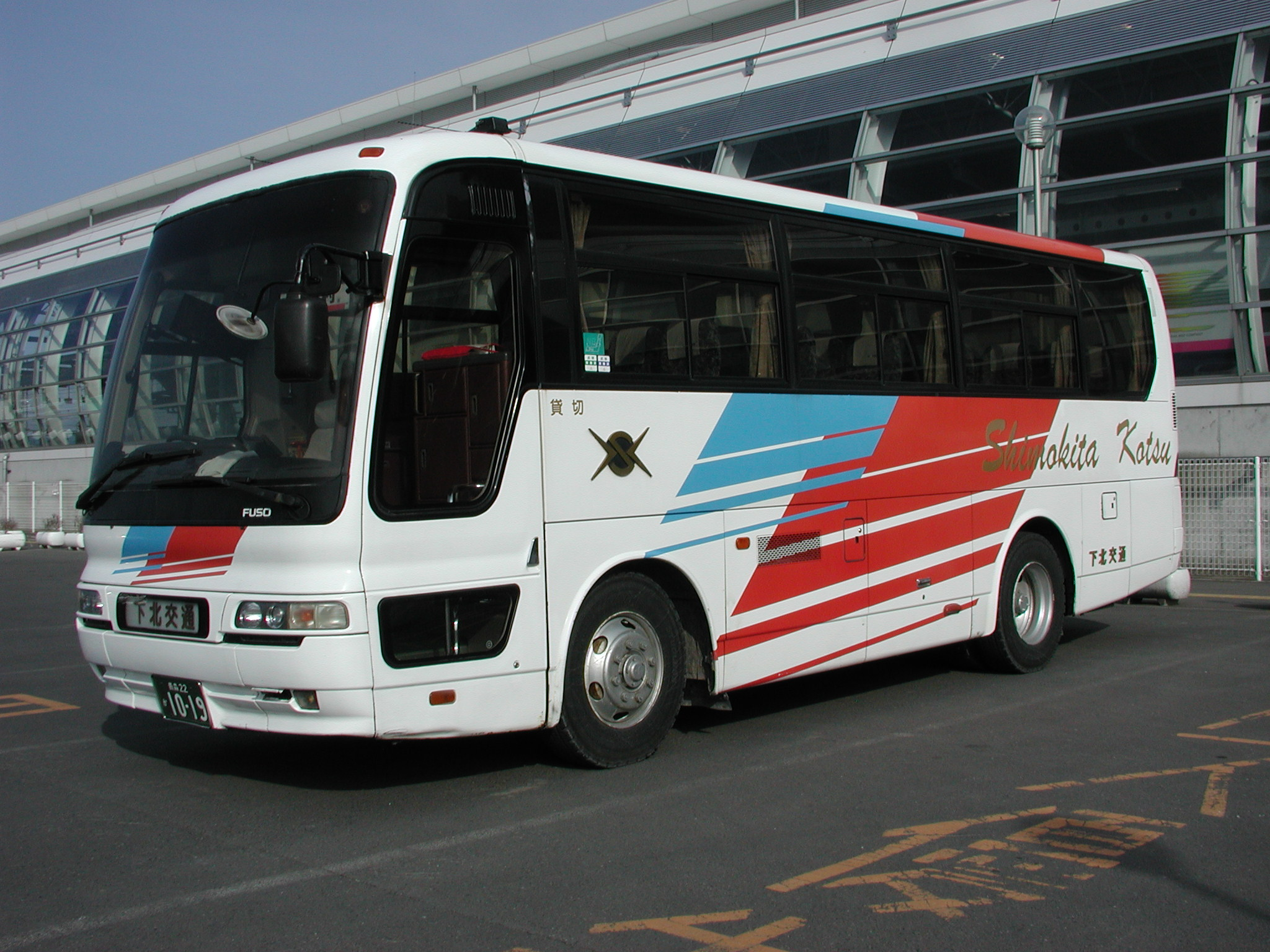 下北交通中型観光貸切塗装（三菱ふそう・エアロバスMM：U-MM826H） 八戸駅西口（青森県ja:八戸市）にて